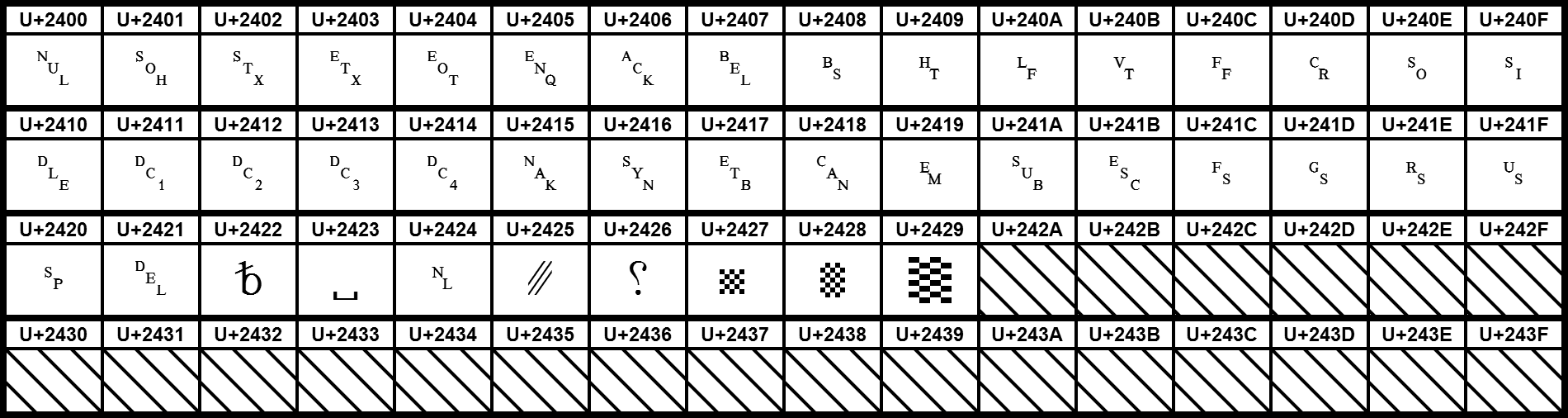 Grafiktafel für den Unicodeblock Symbole für Steuerzeichen. Schraffierte Felder sind unbesetzte Codepoints.